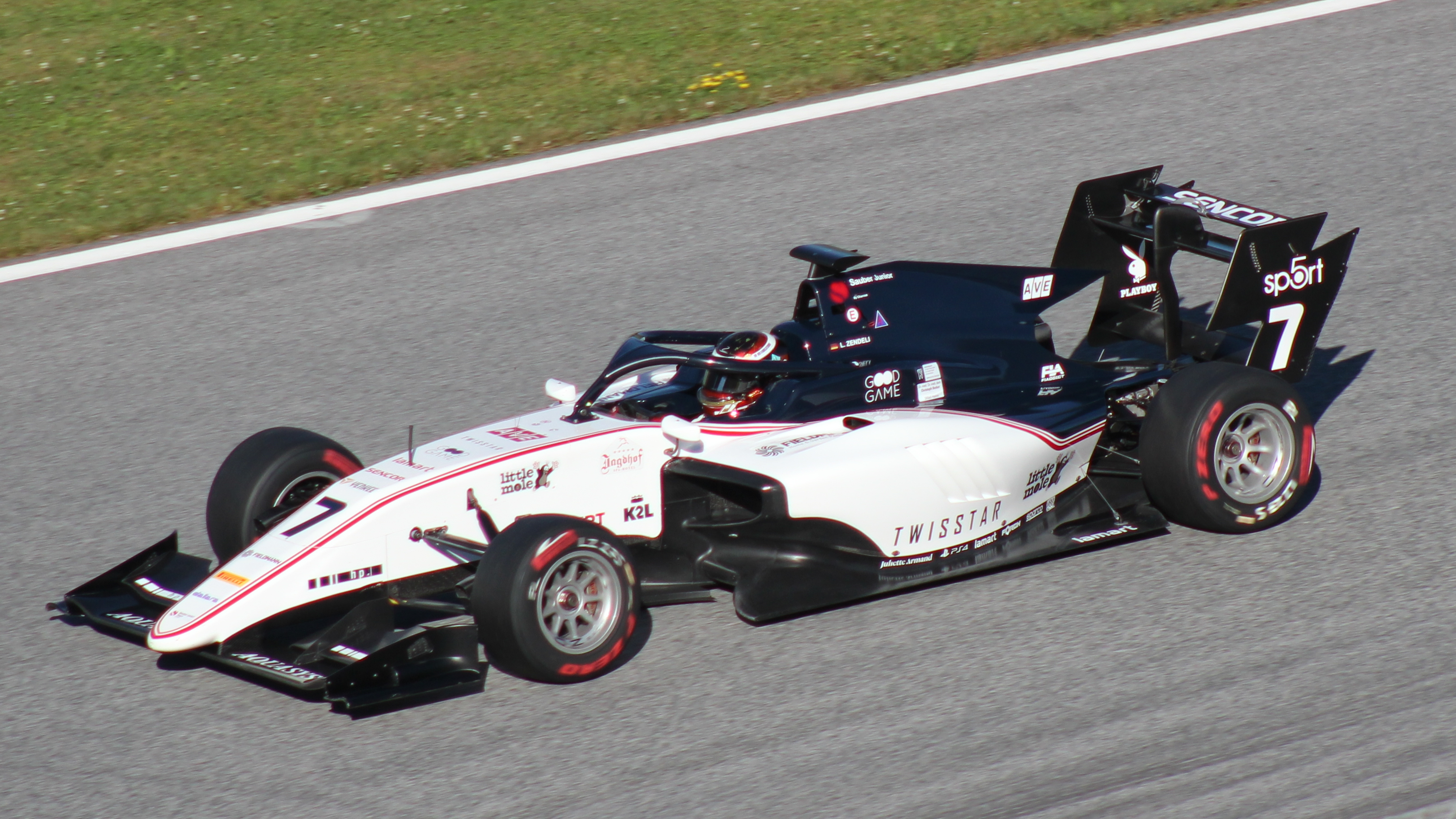 Zendeli beim Rennwochenende in Österreich 2019